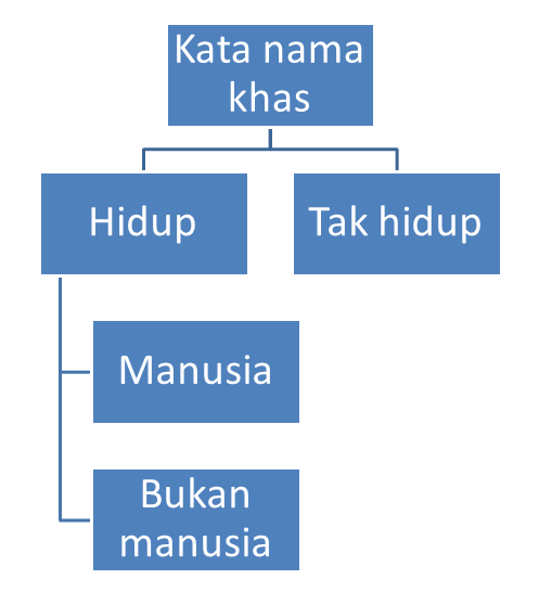 Diagram kata nama khas